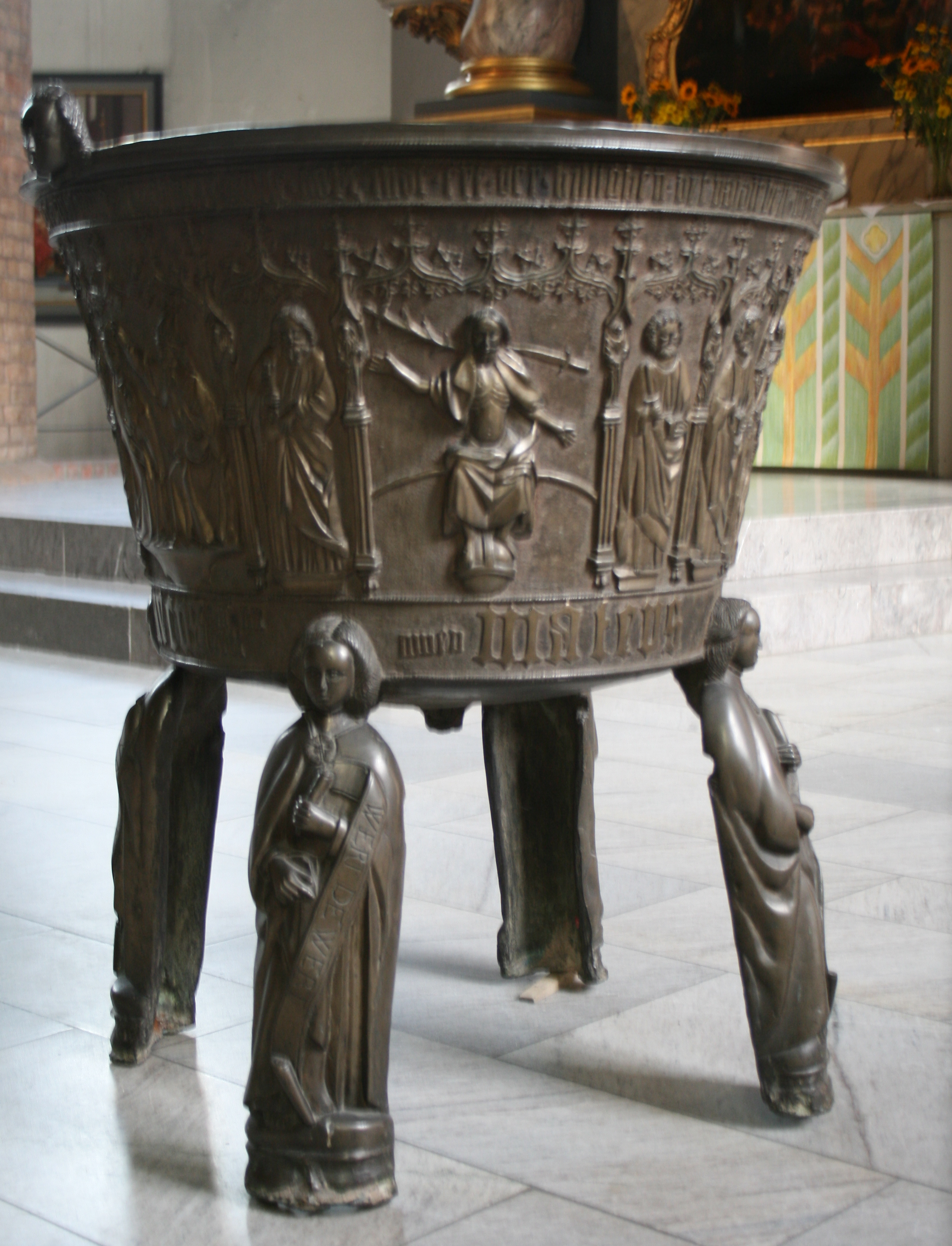 Bronzetaufe der Nikolaikirche (Flensburg Nikolaikirchhof 8)